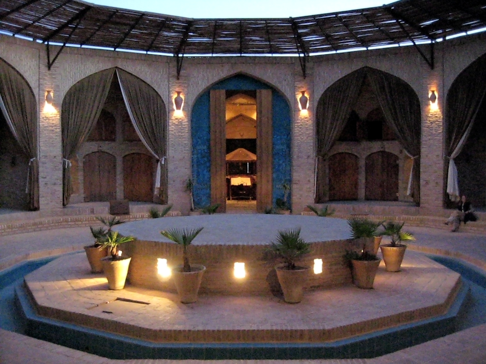 Caravanserai Zein-o-din, Yazd, Iran